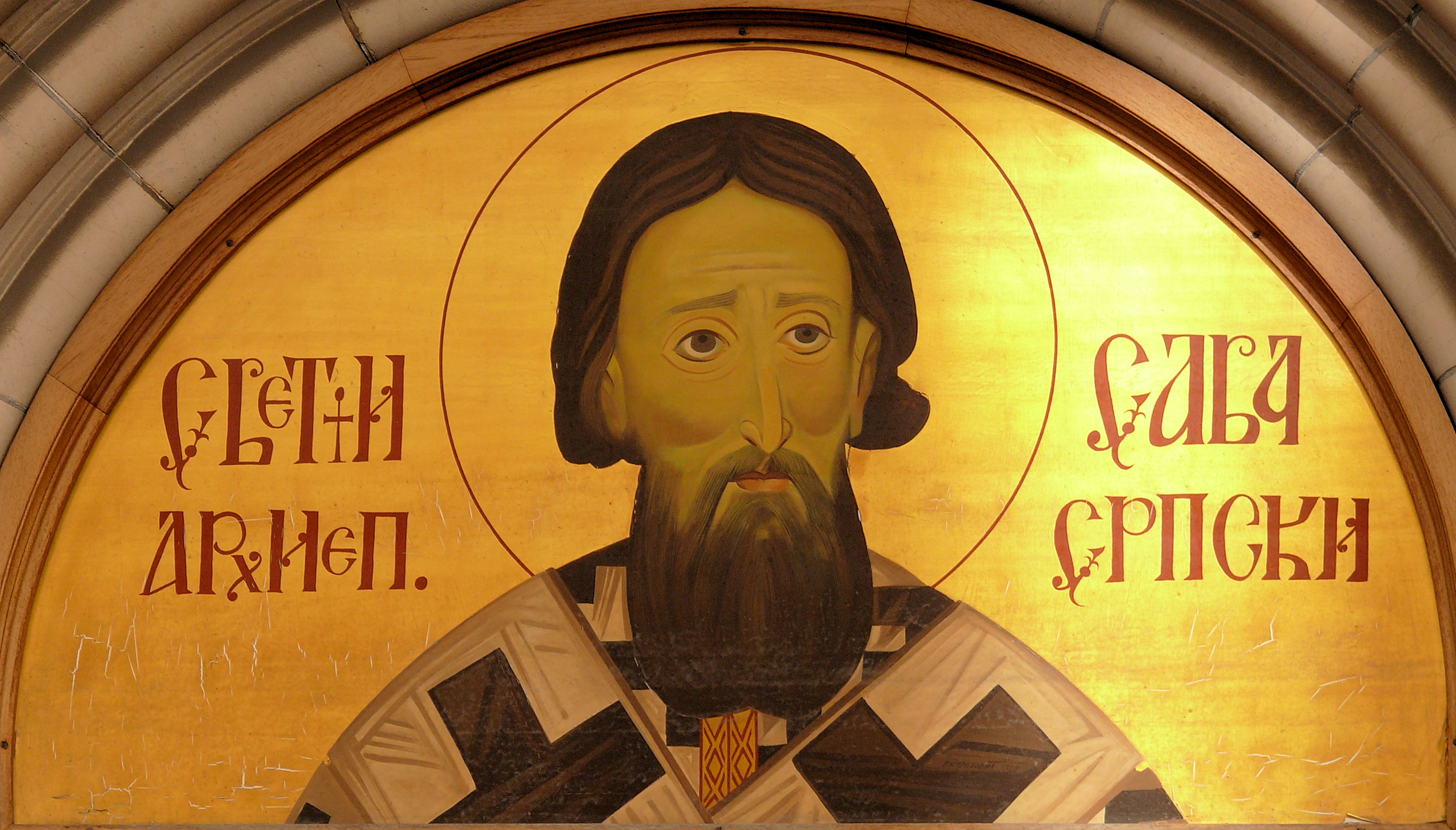 Paris - Eglise Saint-Sava - Tympan